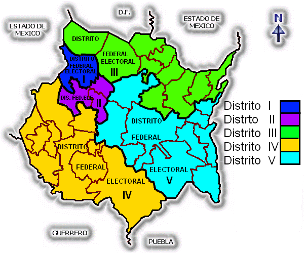 ubicacion de los distritos federales electorales de morelos